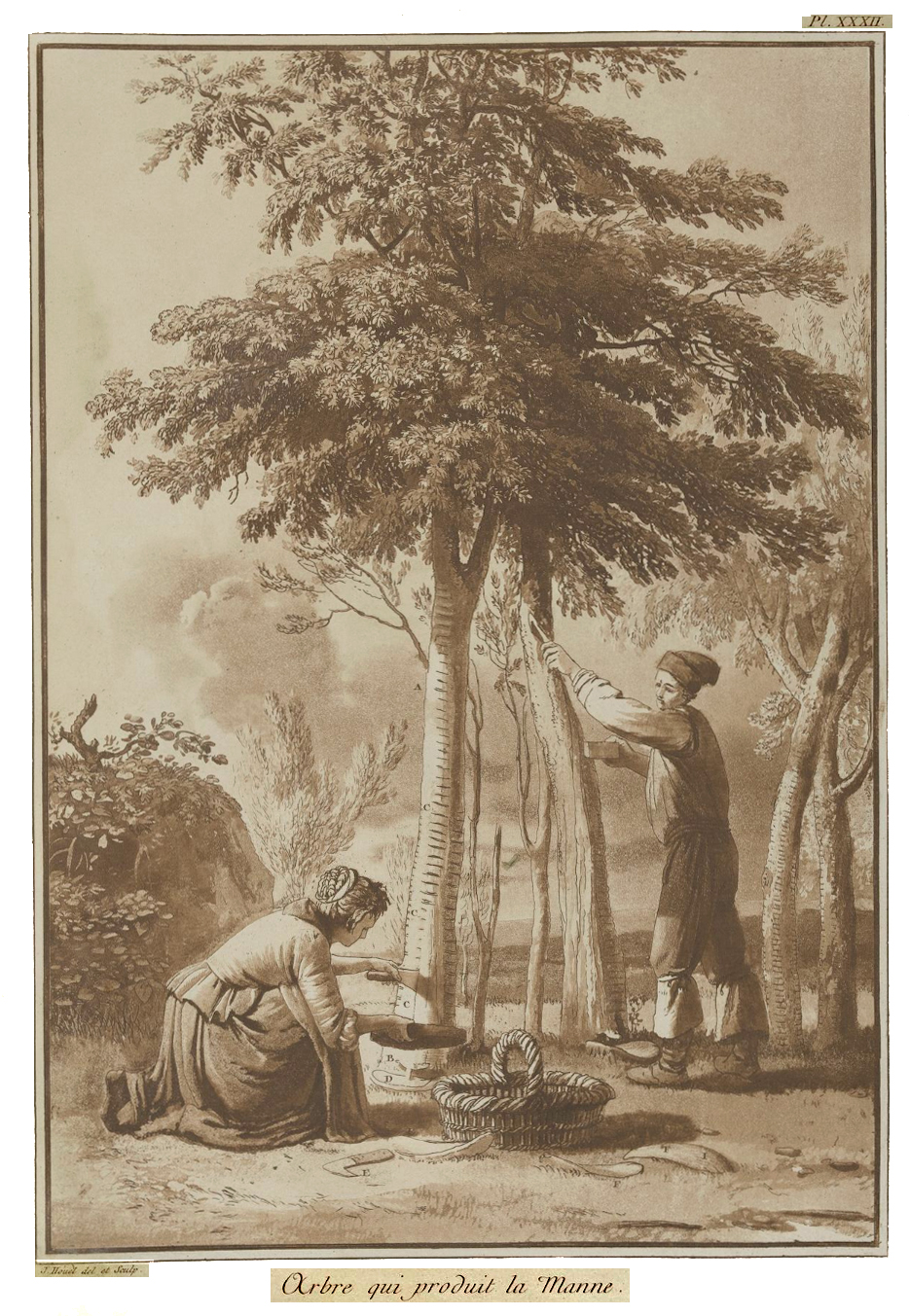 Manna-Ernte in Sizilien